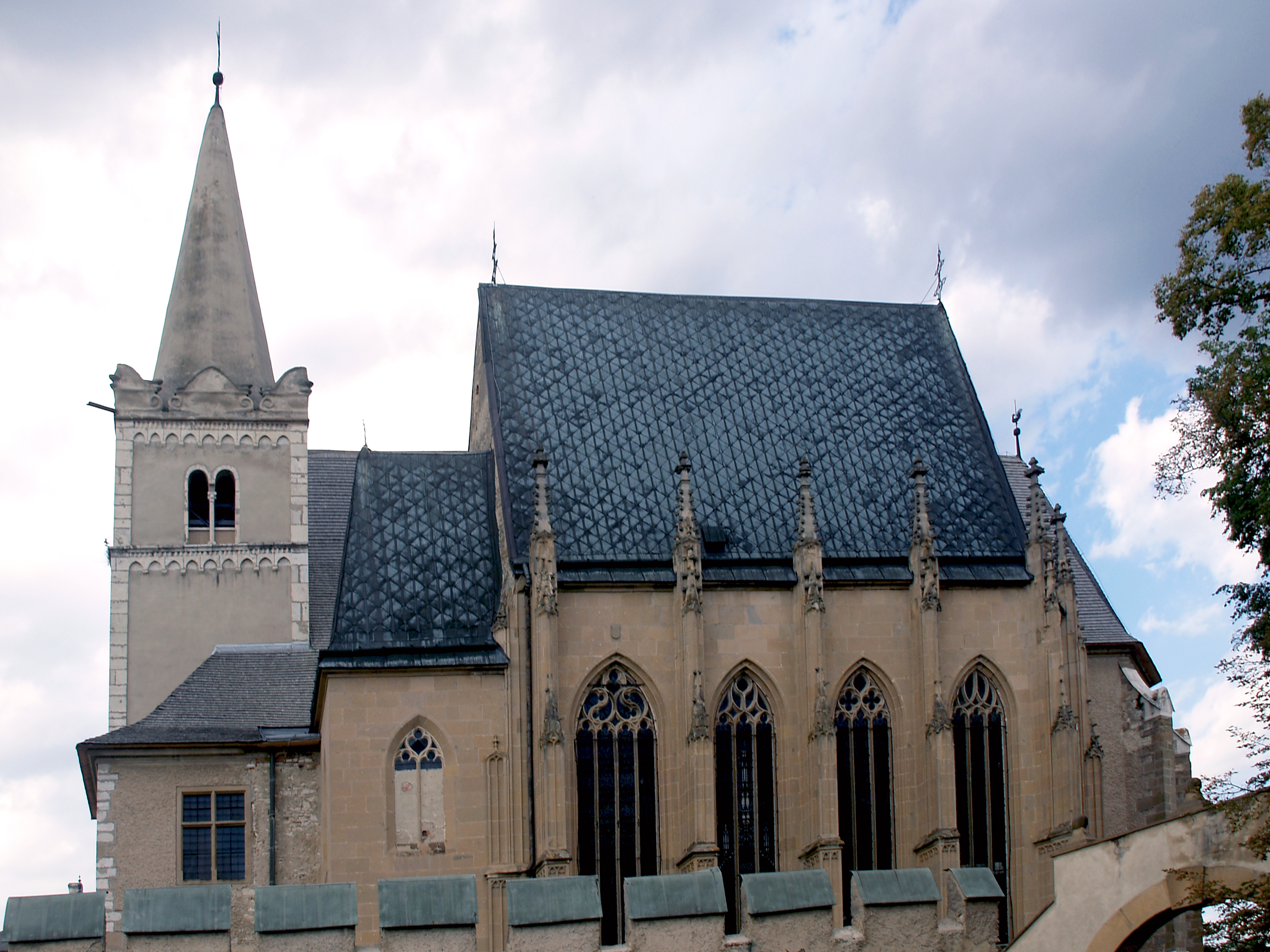 Spišské Podhradie - St-Martin This medium shows the protected monument with the number 704-782/0 in the Slovak Republic.